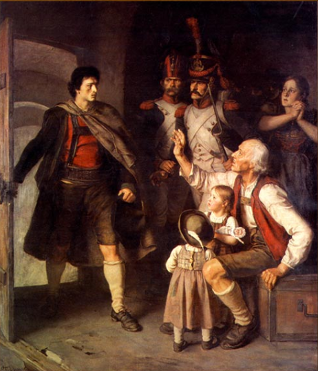 Le retour à la rescousse du père